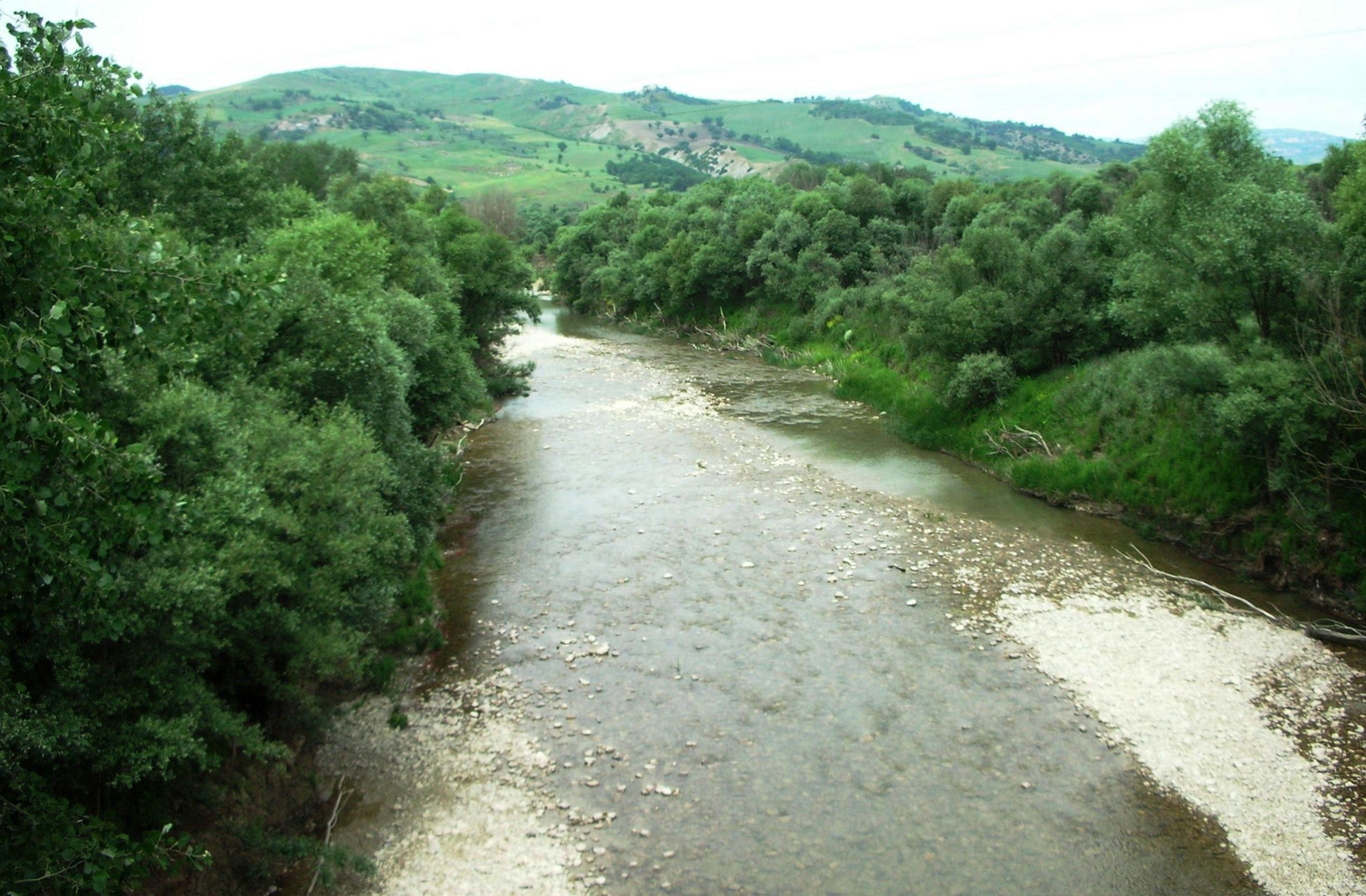 Fiume Fortore